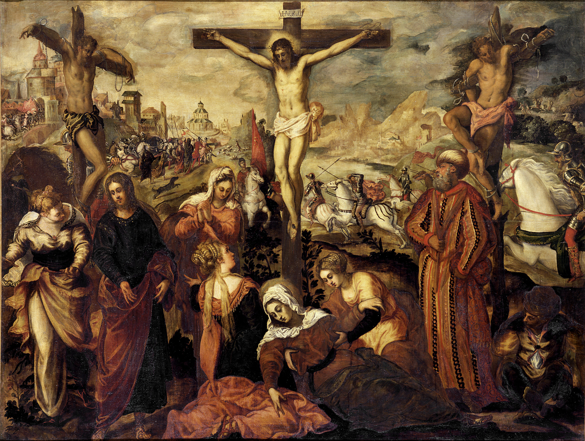 Crucifixion